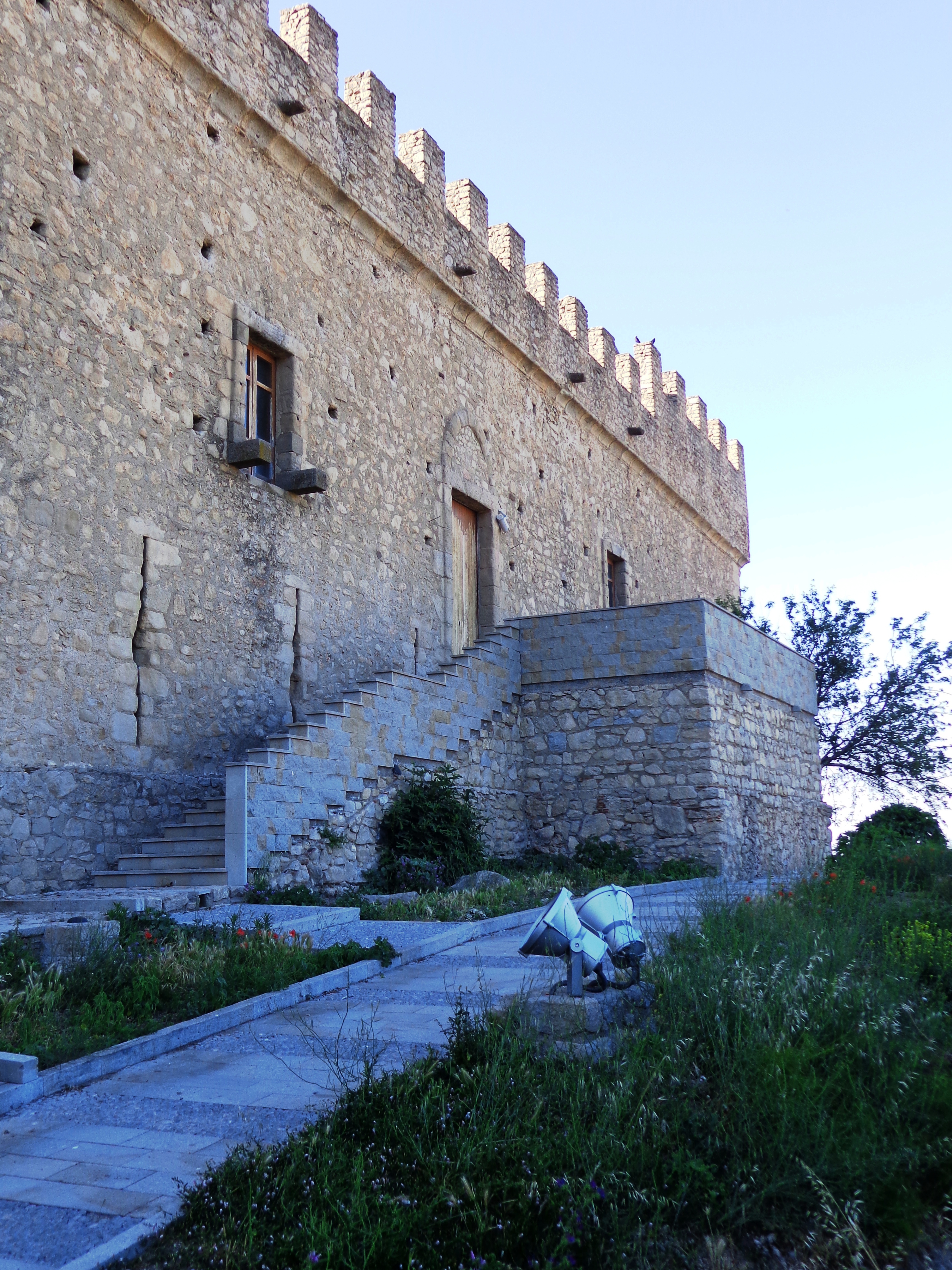 Castello di Montalbano Elicona lato est - Ingresso Nobile